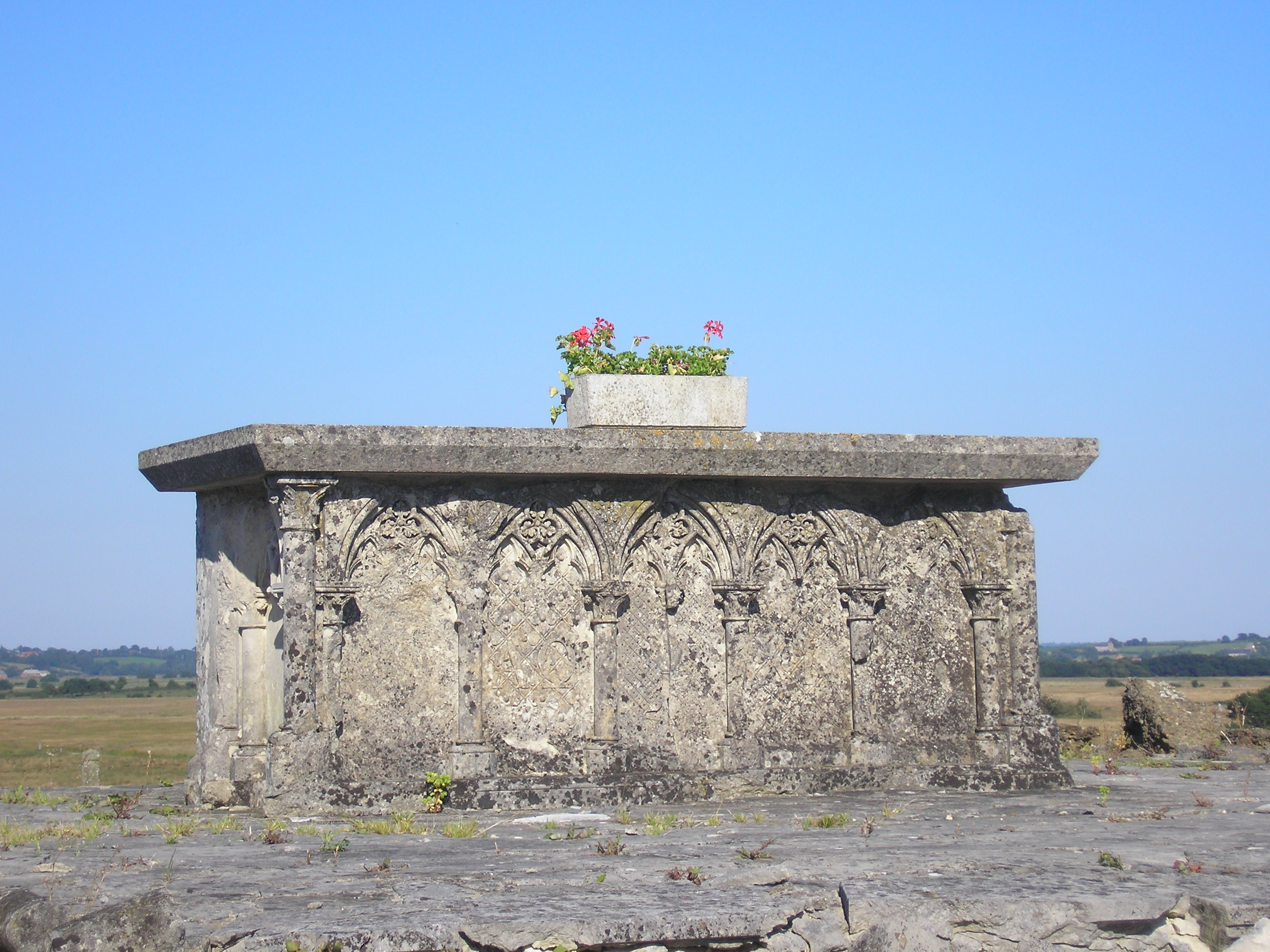 Saint-Georges-de-Bohon (Normandie, France). L'autel de l'ancienne église.